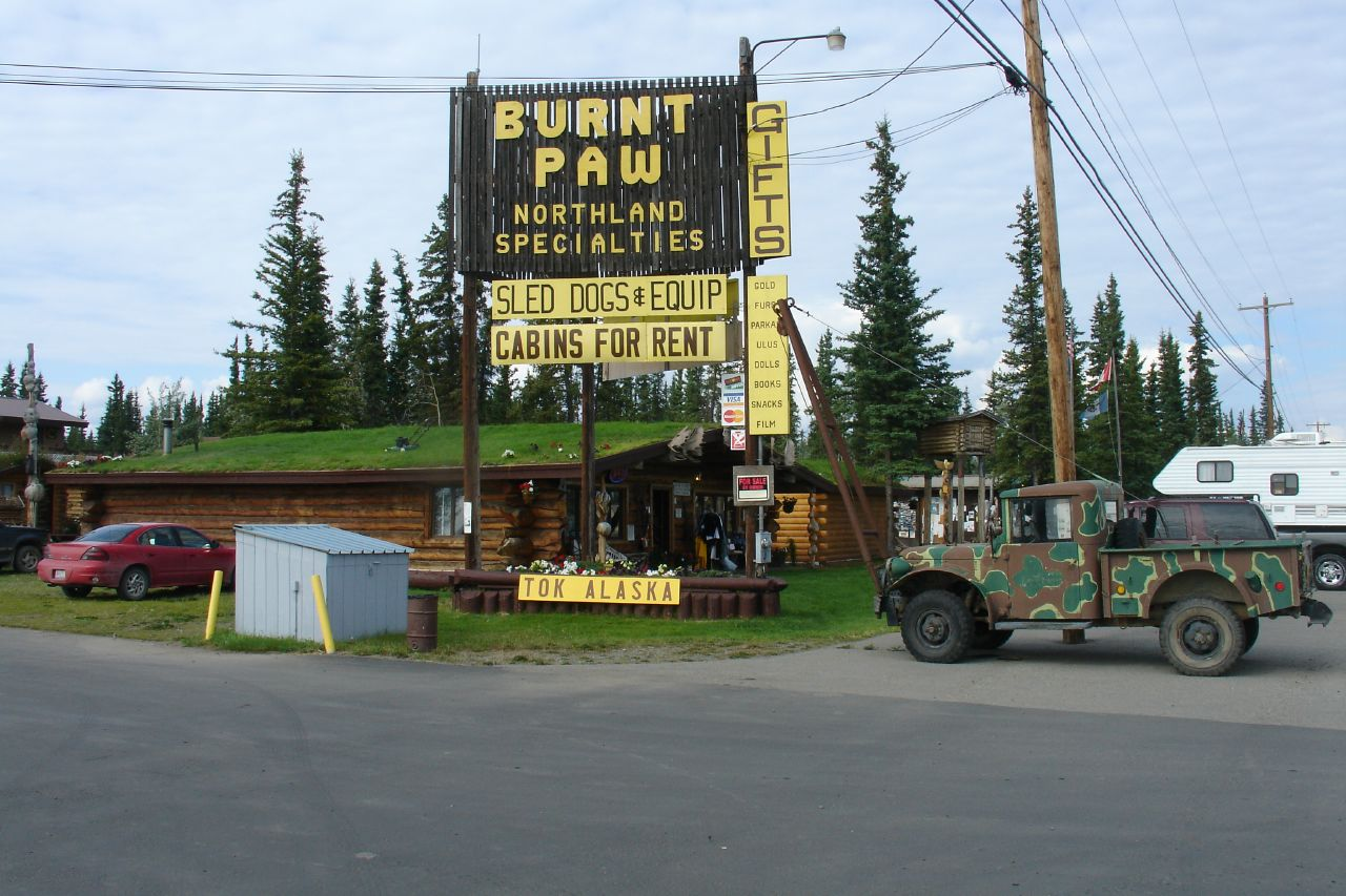 Tok, Alaska